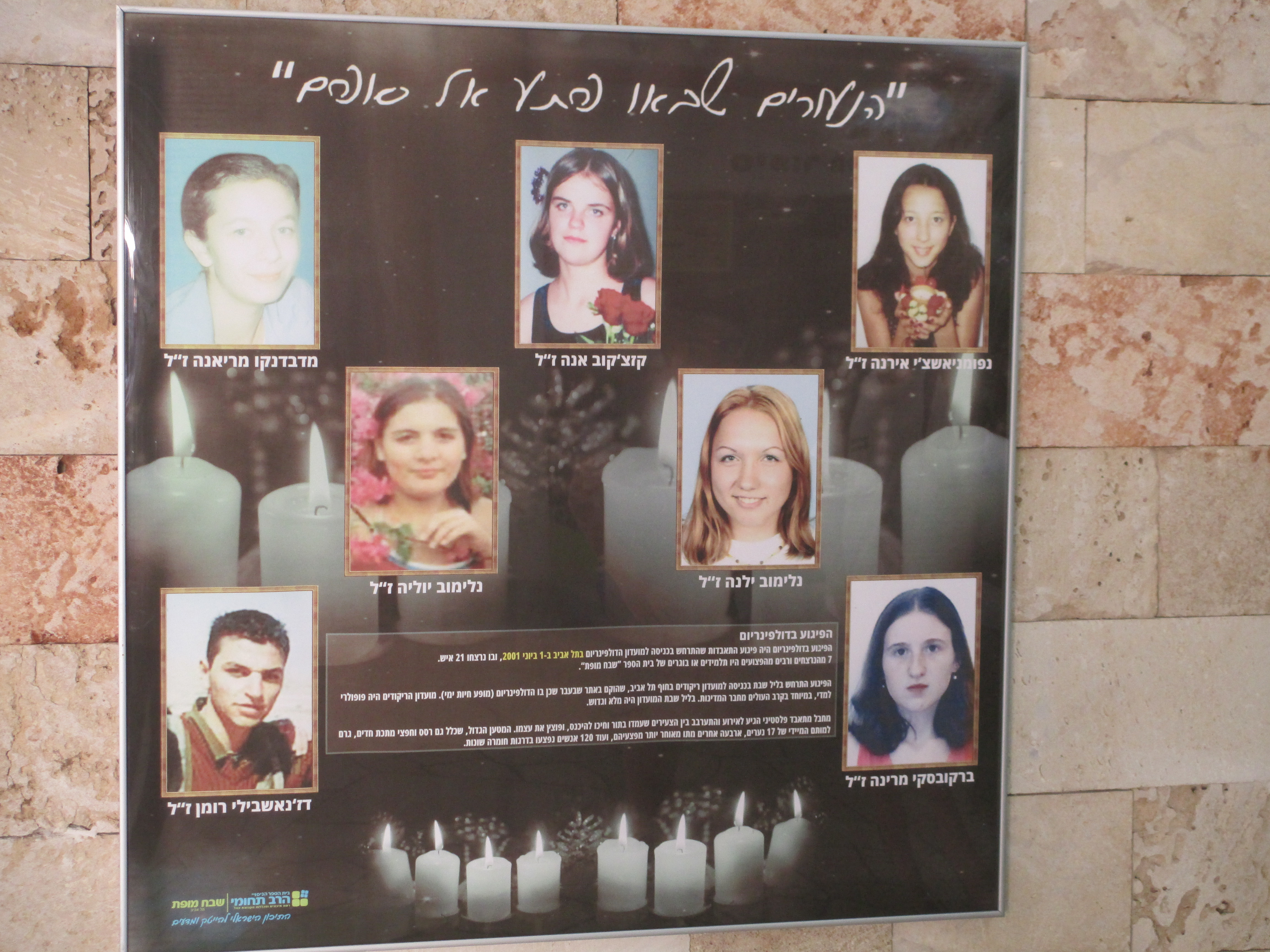 פינת זיכרון לתלמידי בית הספר שבח מופת שנרצחו בפיגוע בדולפינריום